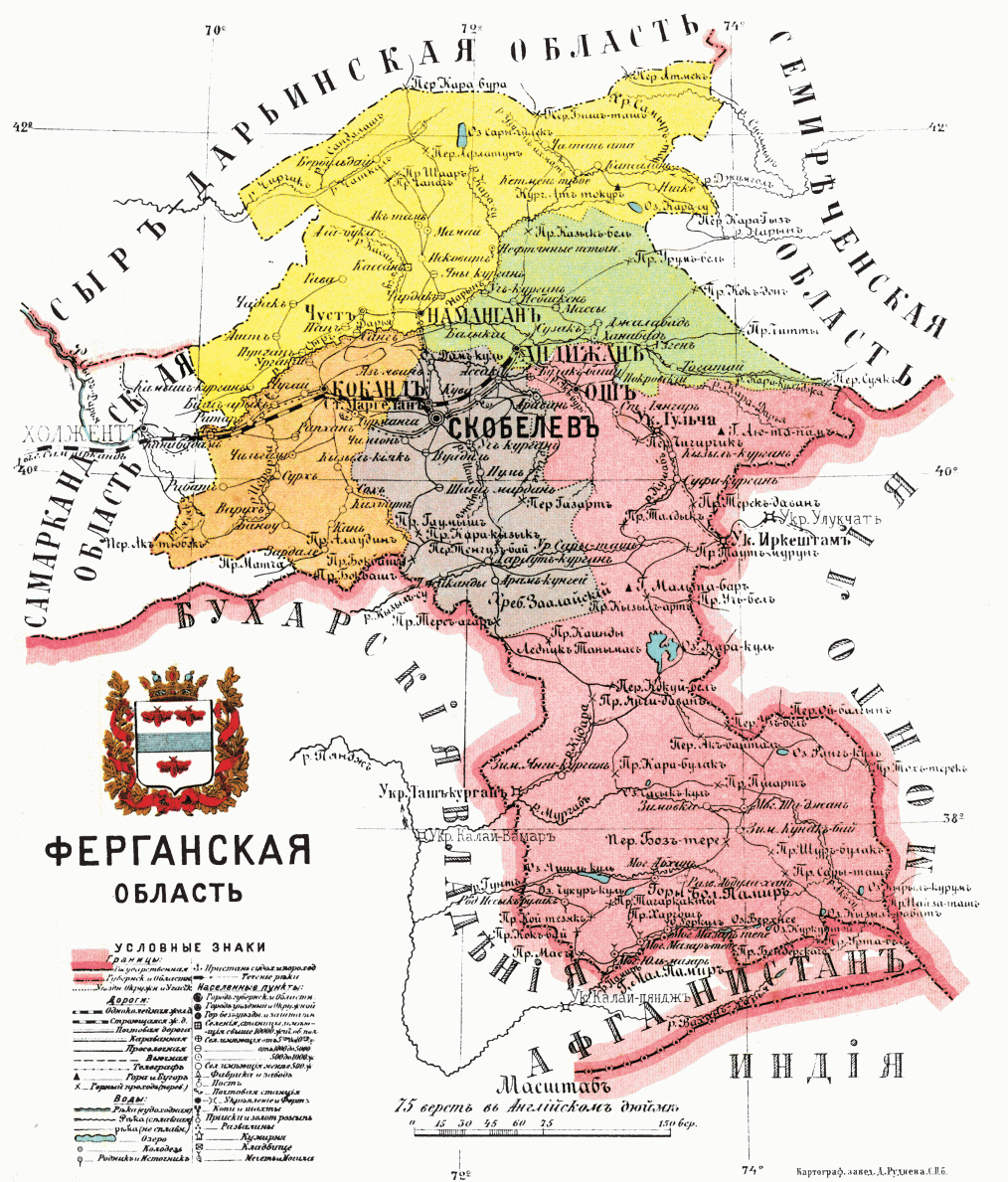 Карта Ферганской области, 1913